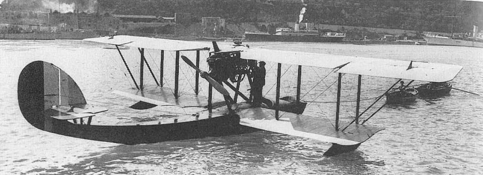 Levy GL40